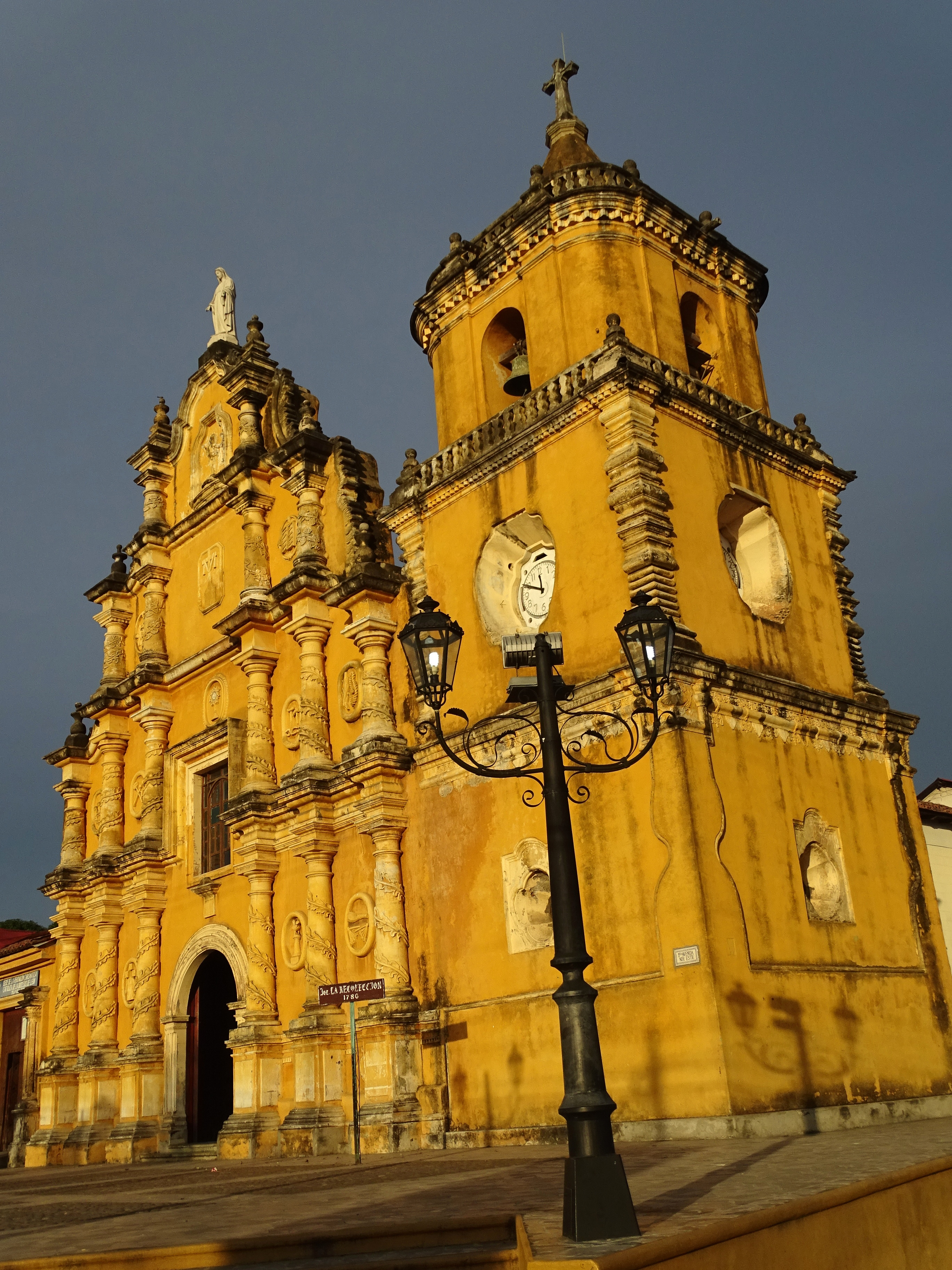 Iglesia de la Recoleccion - Leon - Nicaragua - 01